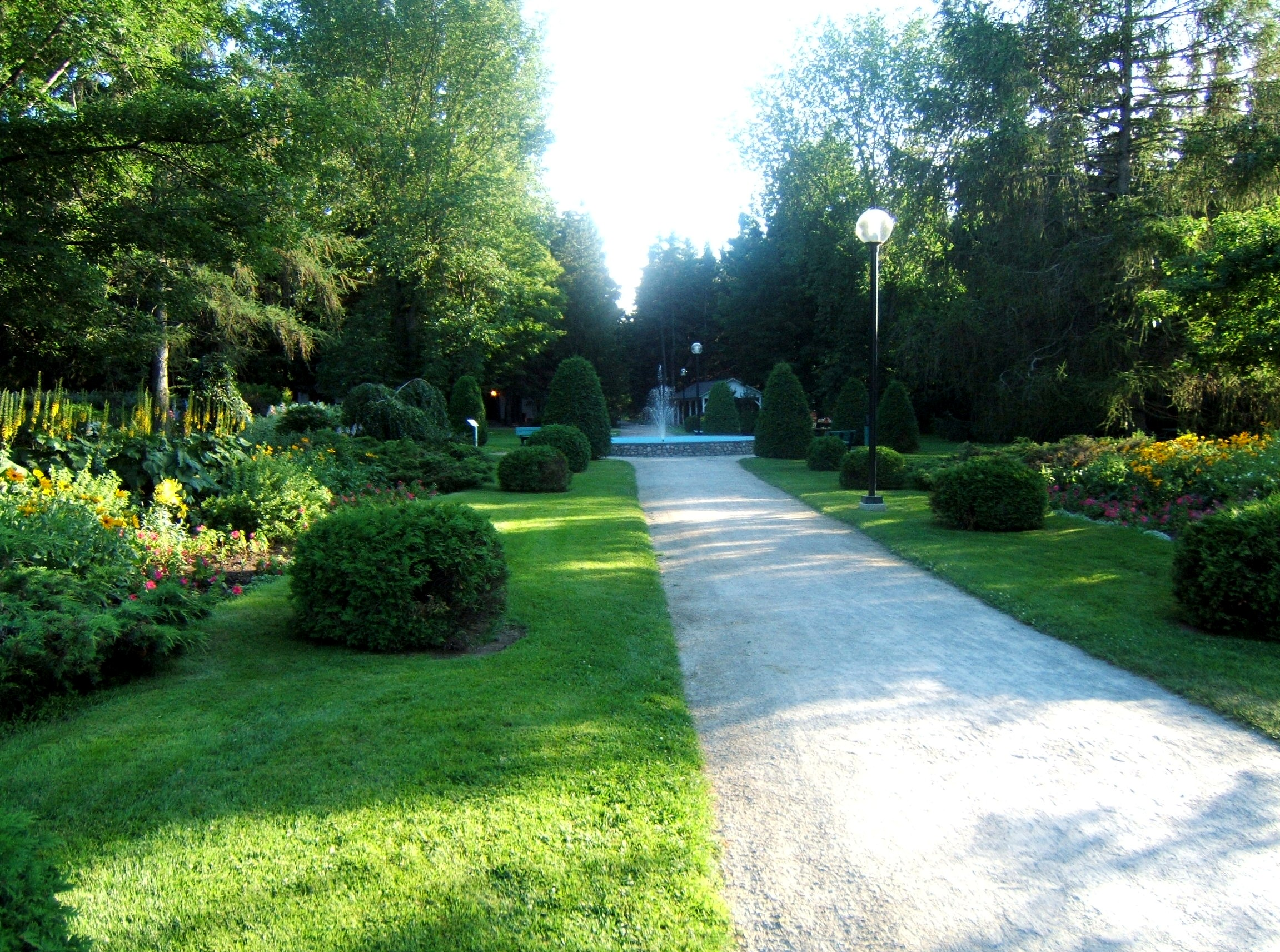 Entrée du Parc Lepage de Rimouski. Véritable poumon de verdure au centre de la ville de Rimouski. Photo prise par JF Lepage à l'été 2006..